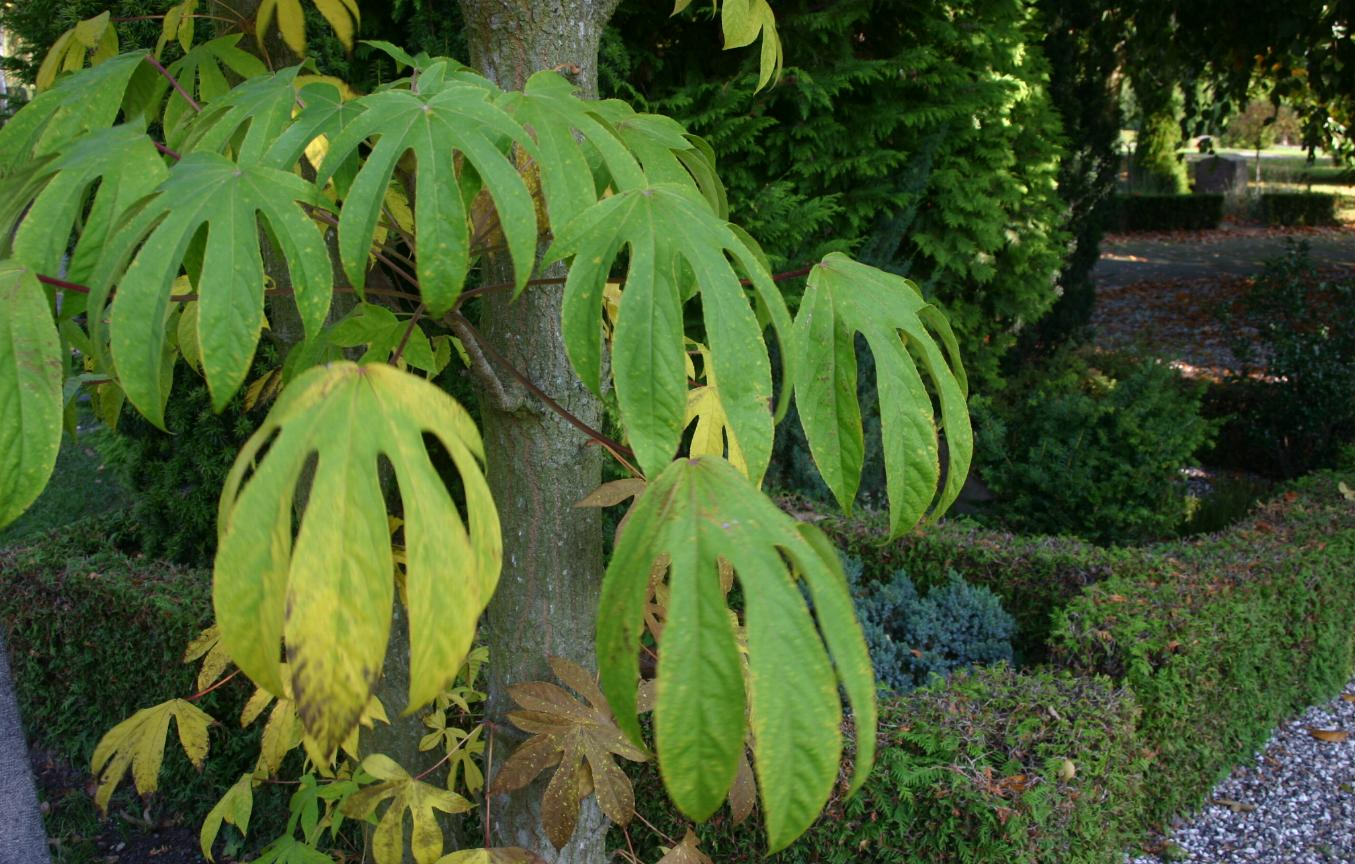 Kalopanax septemlobus: Autumn-coloured leaves